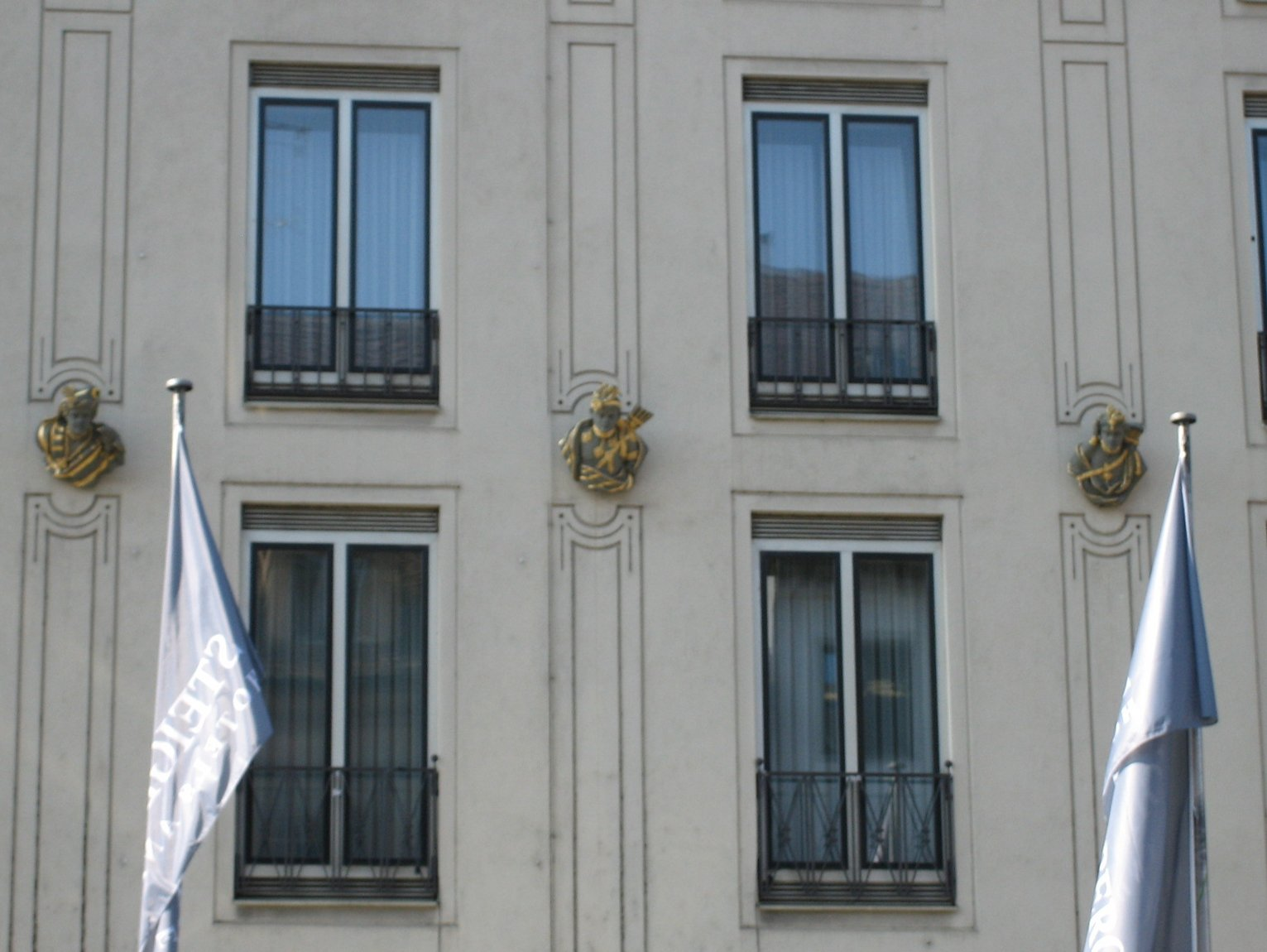 Hotel Drei Mohren in Augsburg; die drei Büsten von Mohren, die Pate standen für den Hotelnamen